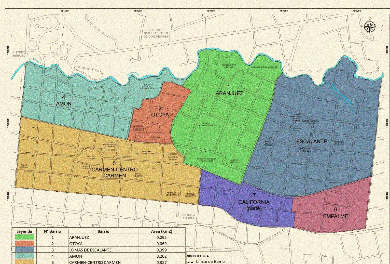 Mapa del distrito del Carmen hecho en base al de la Municipalidad de San José.